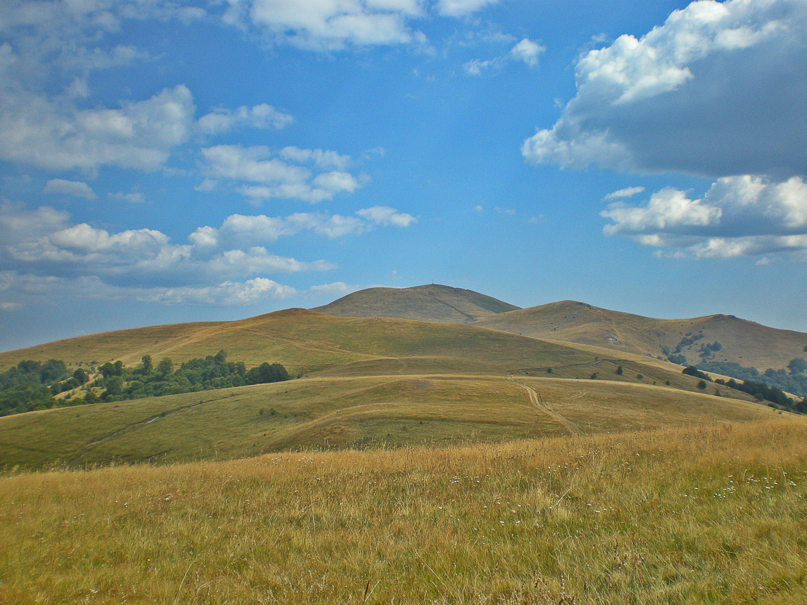 Највиши врх планине Дукат